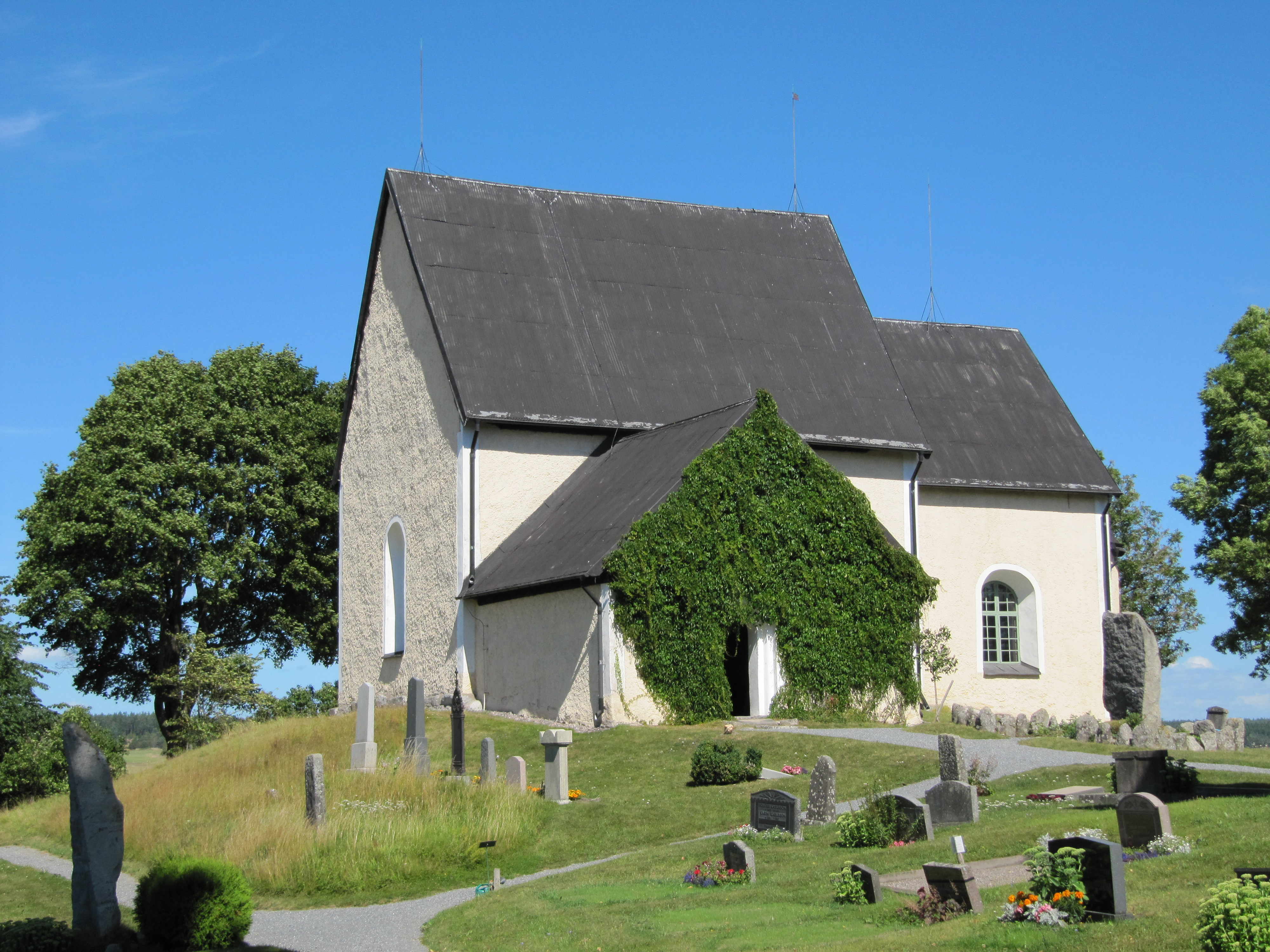 Markims kyrka